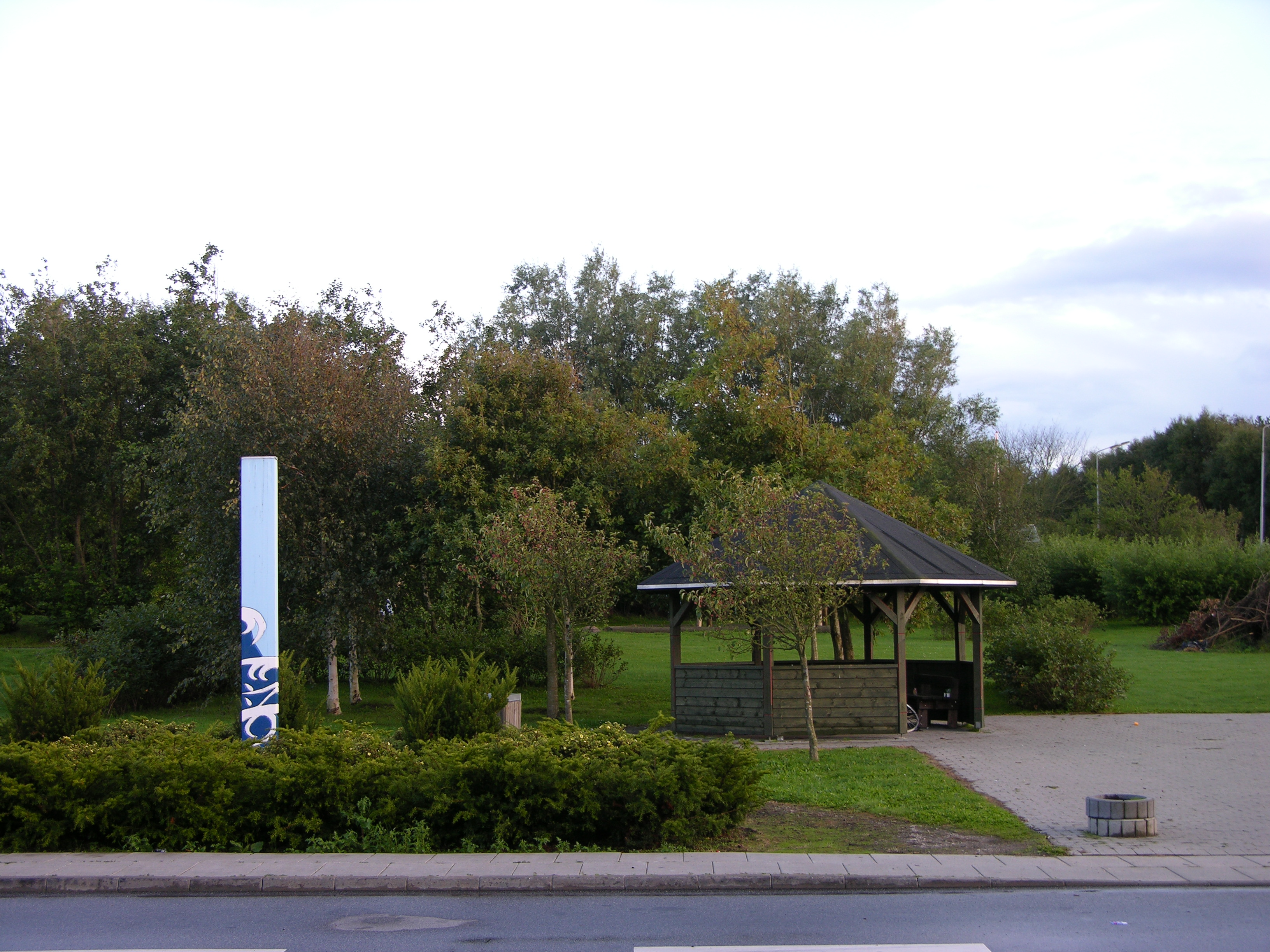 Udsigt over den grønne plads overfor købmanden i Horne, i billedet bla. pavillonen, Sankt Hans pladsen og stolpen som markerer tilhørsforholdet til Hirtshals kommune.